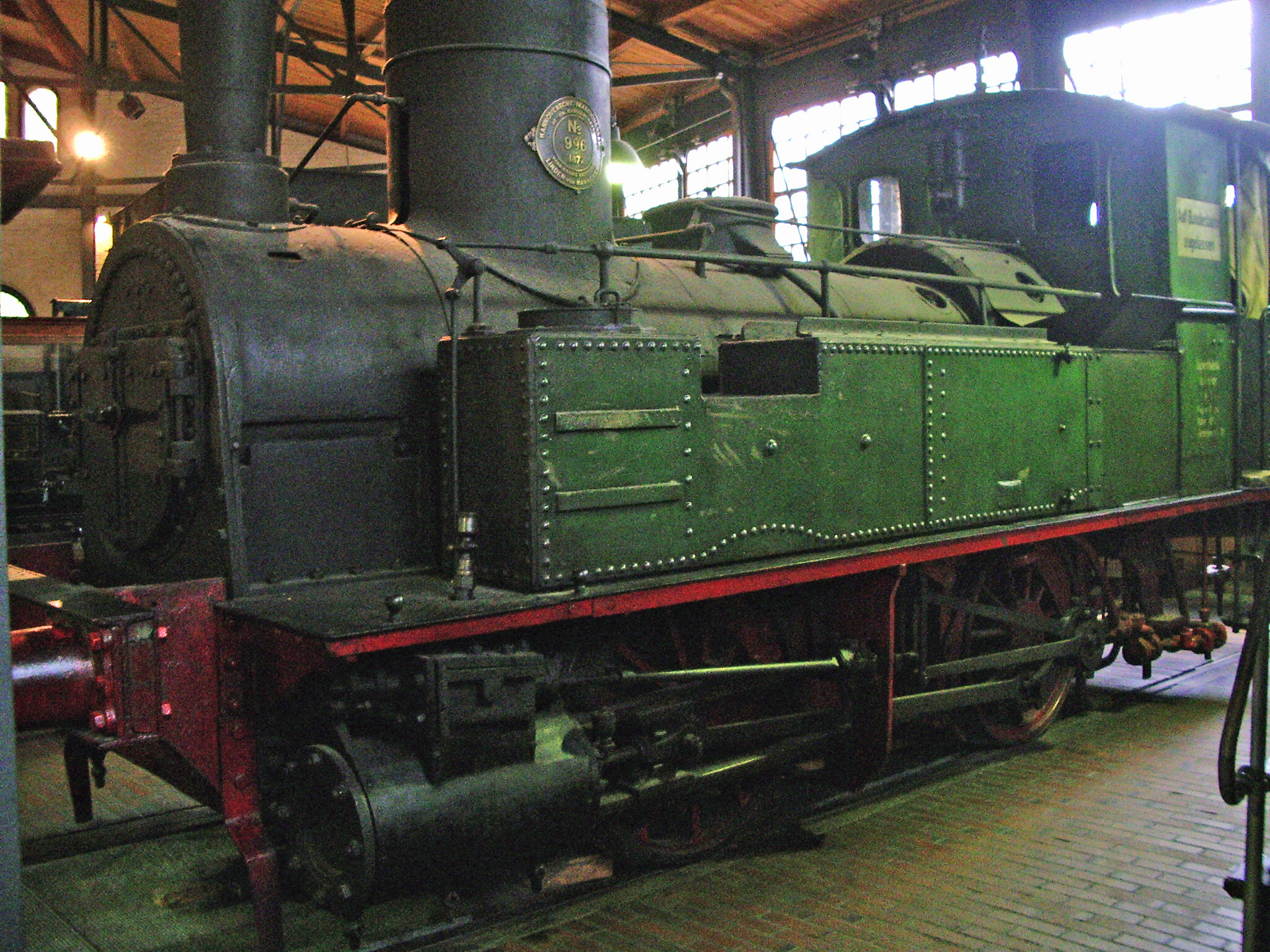 Preußische T 1 "Kiel" aus dem Jahr 1872 im Deutsches Technikmuseum Berlin. Auch Braunschweigische Eisenbahn "KIEL", KED Hannover 1417, KED Cassel 1417, KED Cassel 1467, Zuckerfabrik Nörten-Hardenberg 1